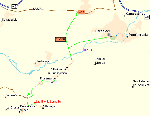 Ruta de acceso al Castillo de Cornatel